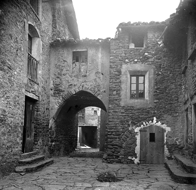 Carrer de Gombrèn. Josep Salvany i Blanch (1918)